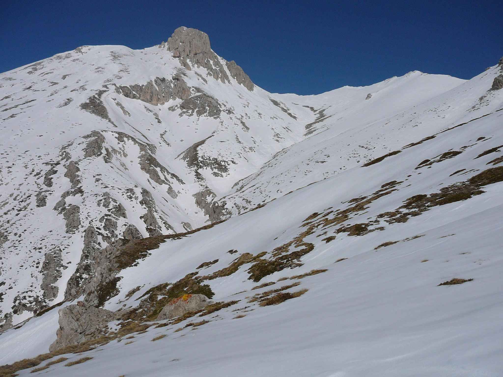 un vallone del Gran Sasso